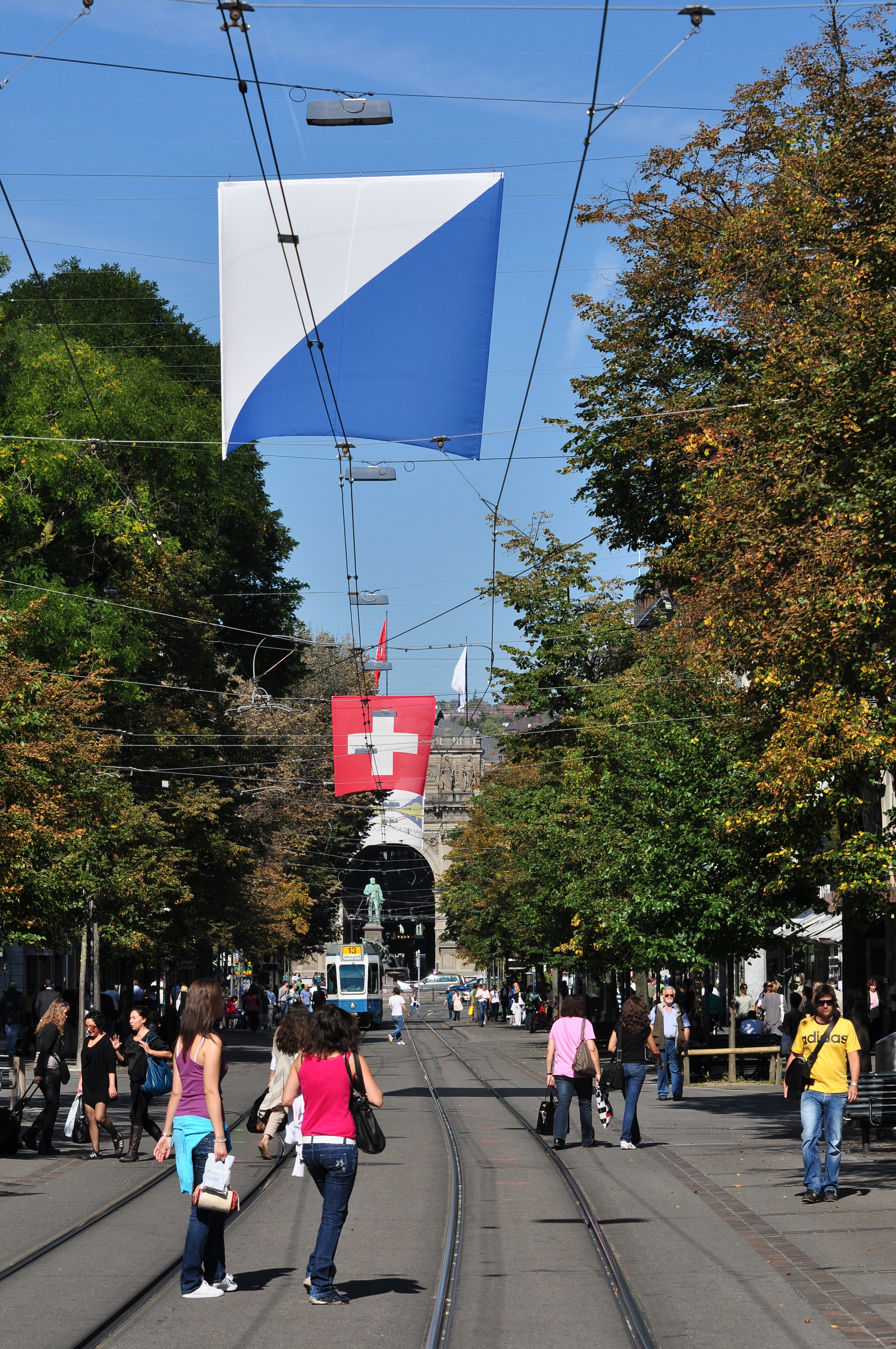 Bahnhofstrasse in Zürich (Switzerland) towards Hauptbahnhof